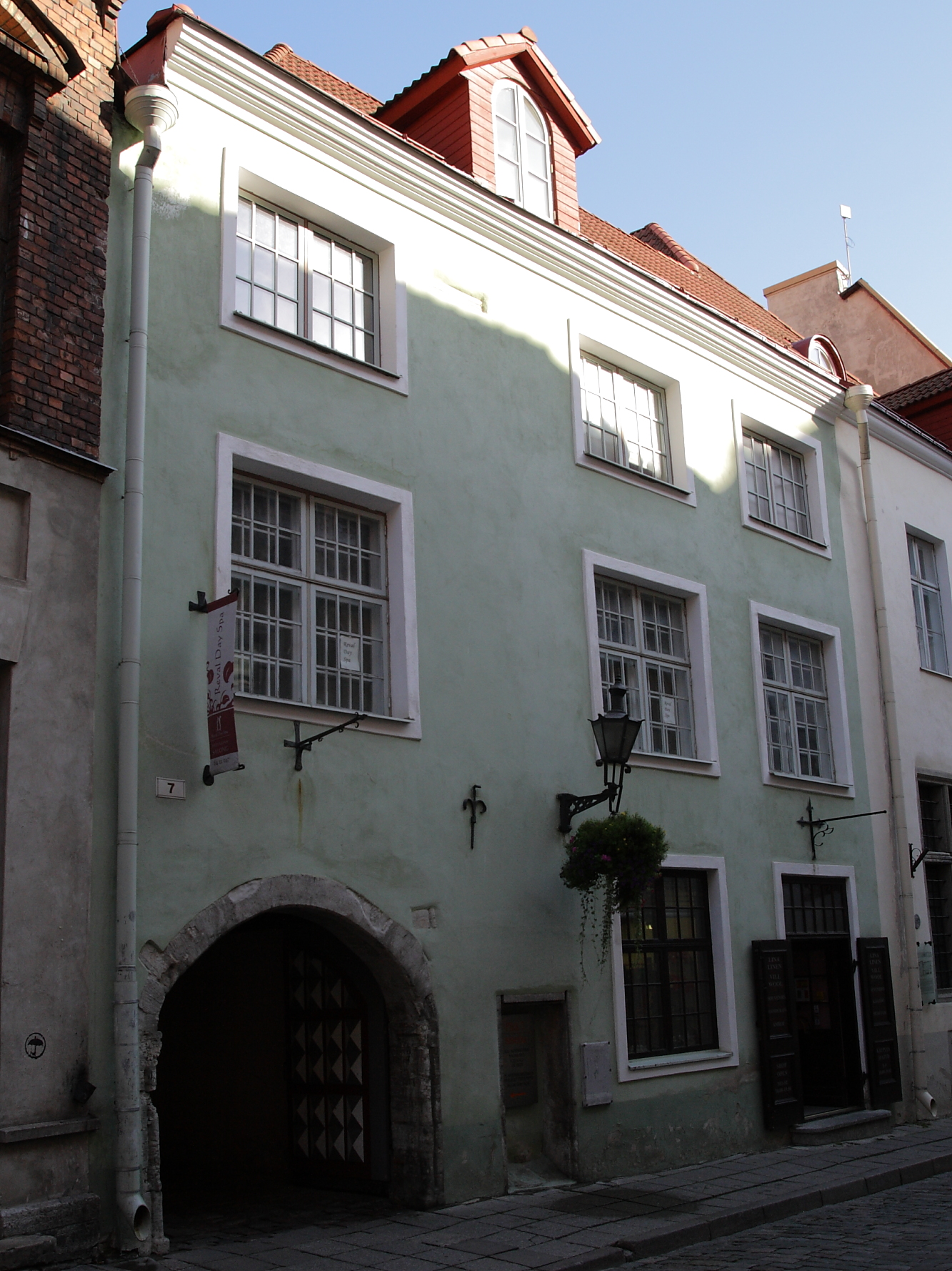 Tallinn, elamu Pikk 7, 15.-20.saj